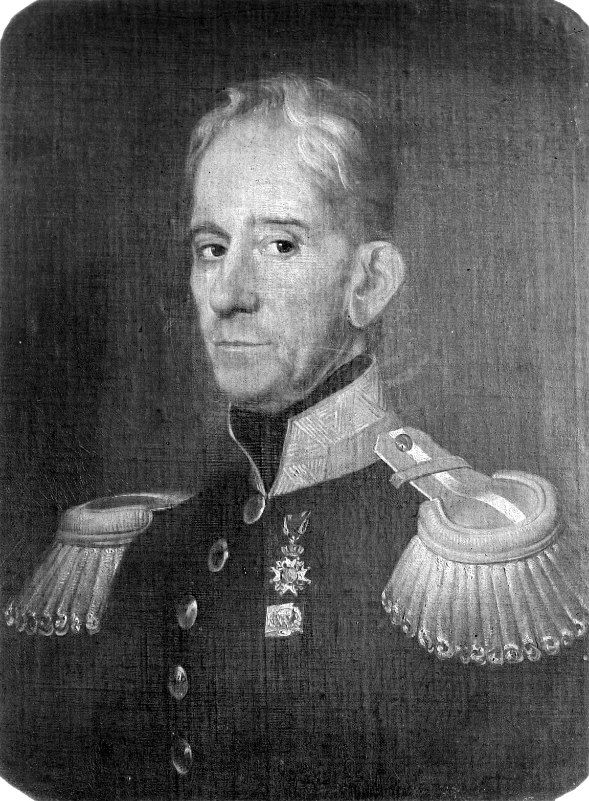 Repronegatief. Foto van een geschilderd portret van Johannes de Veer, de gouverneur van Sint Eustatius van 1837-1854. Er zijn enkele de Veer's in de geschiedenis van de Antillen. Van 1782-1796 is Johannes de Veer Abrahamszn. gouverneur van Curaçao, ten tijde van de opstand van Tula (1795). Van 1803-1806, tussen twee Engelse perioden in, is zijn zoon Abraham de Veer waarnemend bestuurder van Curaçao (later wordt deze nog gouverneur van Sint Eustatius tussen 1817 en 1822 en vervolgens van Suriname, 1822-1828).